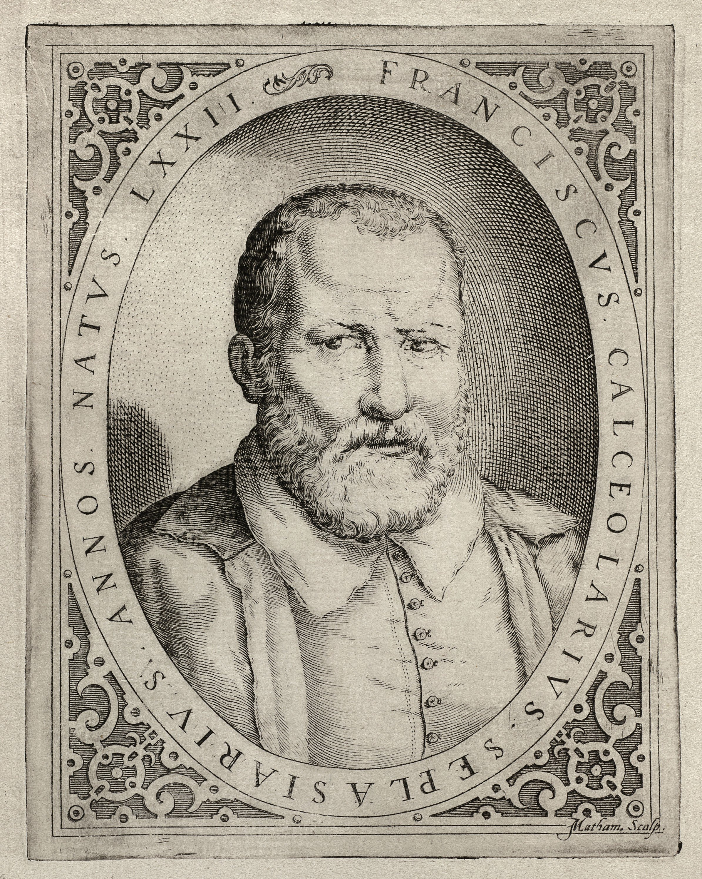 CollectieVoorhelm SchneevoogtInventarisnummerNL-HlmNHA_1477_53010828BeschrijvingPortret van de pharmaceut Francisco Calzolari / Franciscus Calceolarius, op 72- jarige leeftijd.Gravure door Jacob Matham, gesigneerd.FotonummerNL-HlmNHA_1477_53010828DocumenttypePortrettenVervaardigerMatham, Jacob (1571-1631) PersonenCalzolari, Francisco (1521-ca 1600) Begindatum1591Einddatum1596TechniekGrafiek Drukwerk LiteratuurNew Hollstein Dutch, Jacob Matham, 235-1(2)